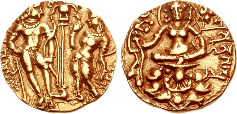 Dinar de ouro de Scandagupta